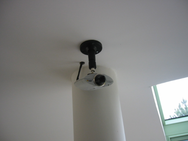 Camera de surveillance TCP / IP